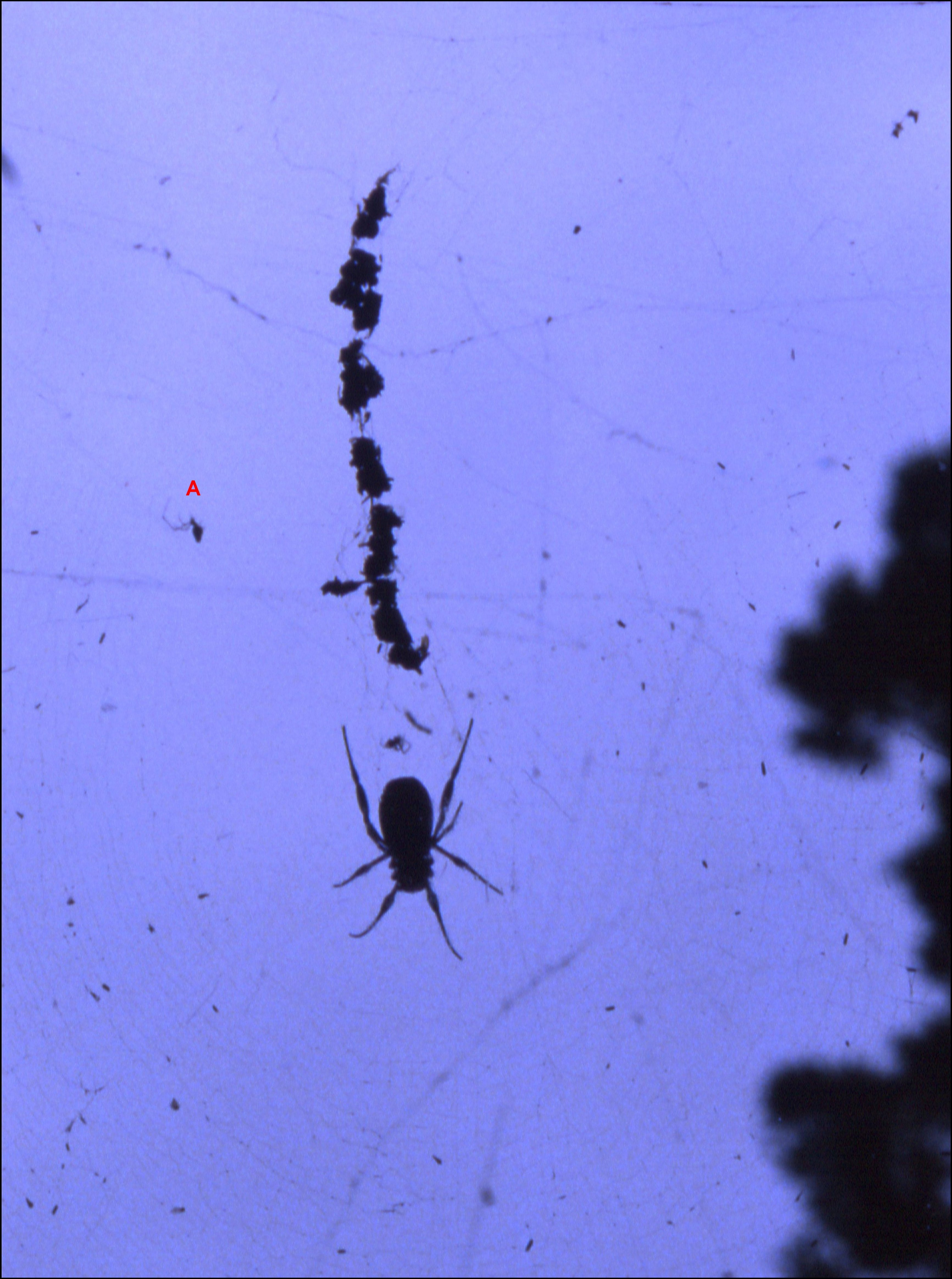 Nephila inaurata femelle, sur sa toile pourvue d'un stabilimentum linéaire vertical constitué de débris de proies en "pelotes". La Réunion. D'après une diapositive.